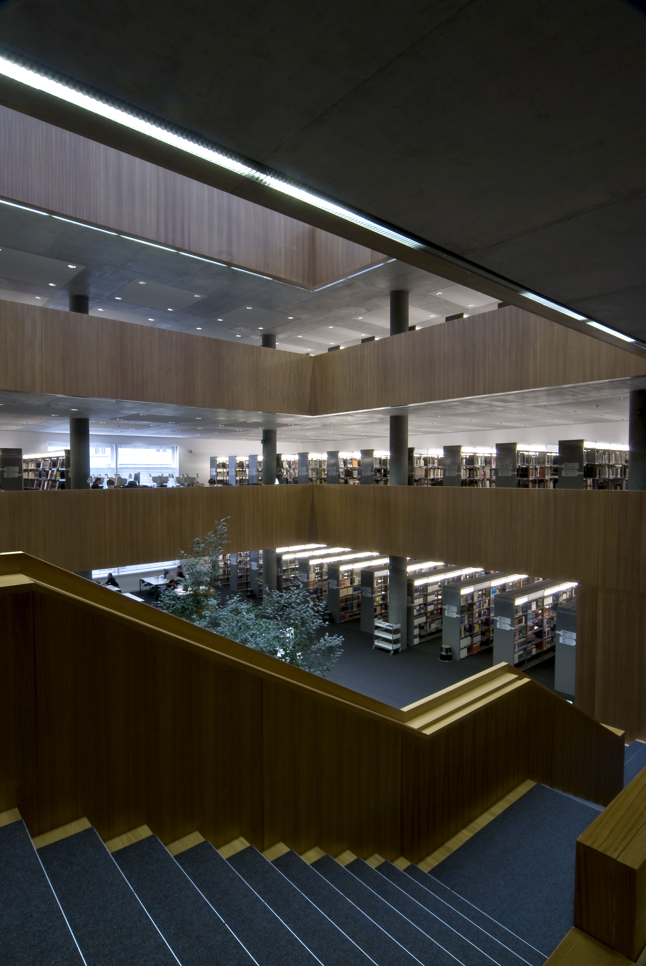 Innenansicht der Universitätsbibliothek Bozen mit Blick auf den Lichthof, Arbeitsplätze und Bücherregale